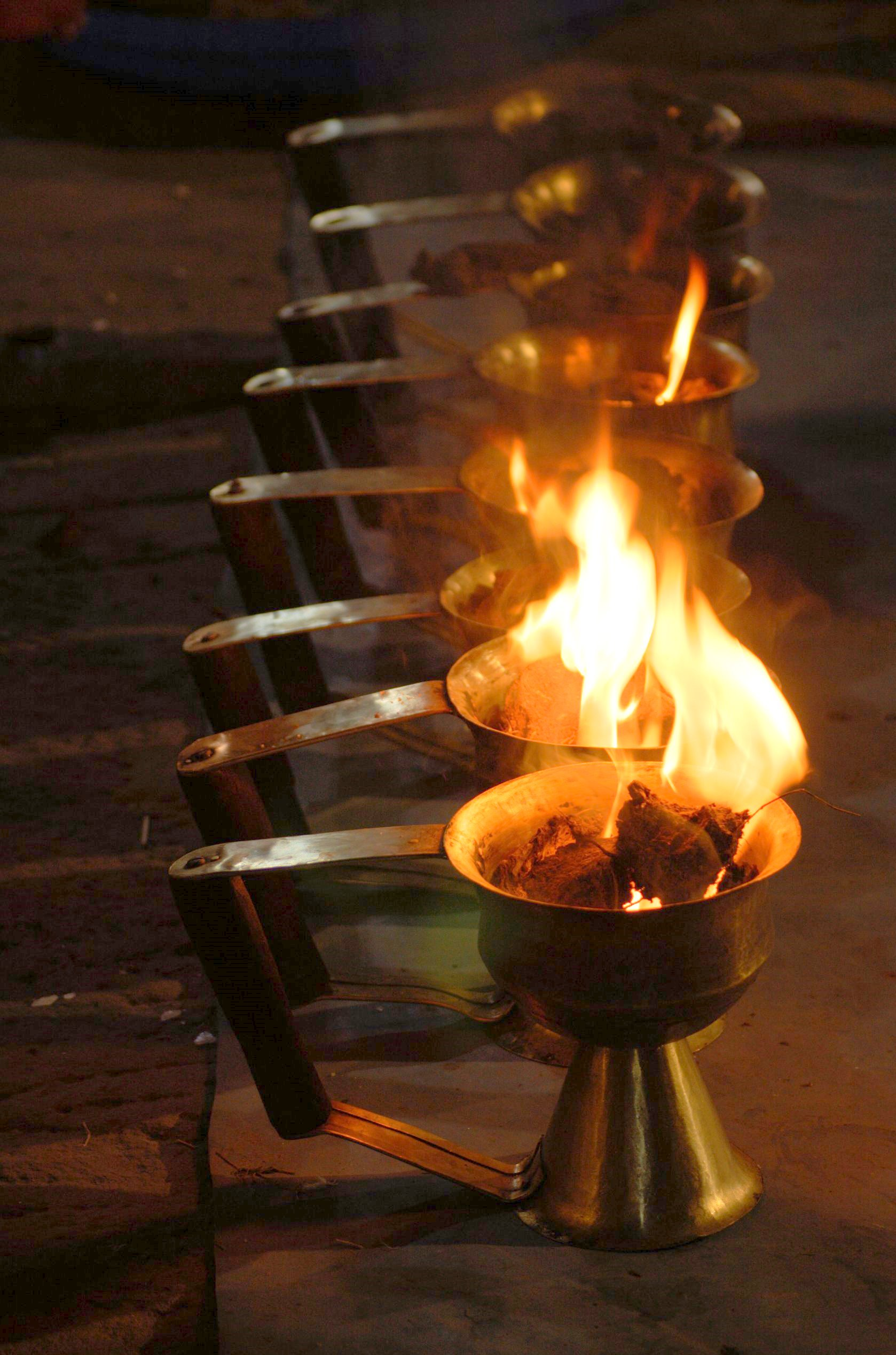 Aarti lamps India